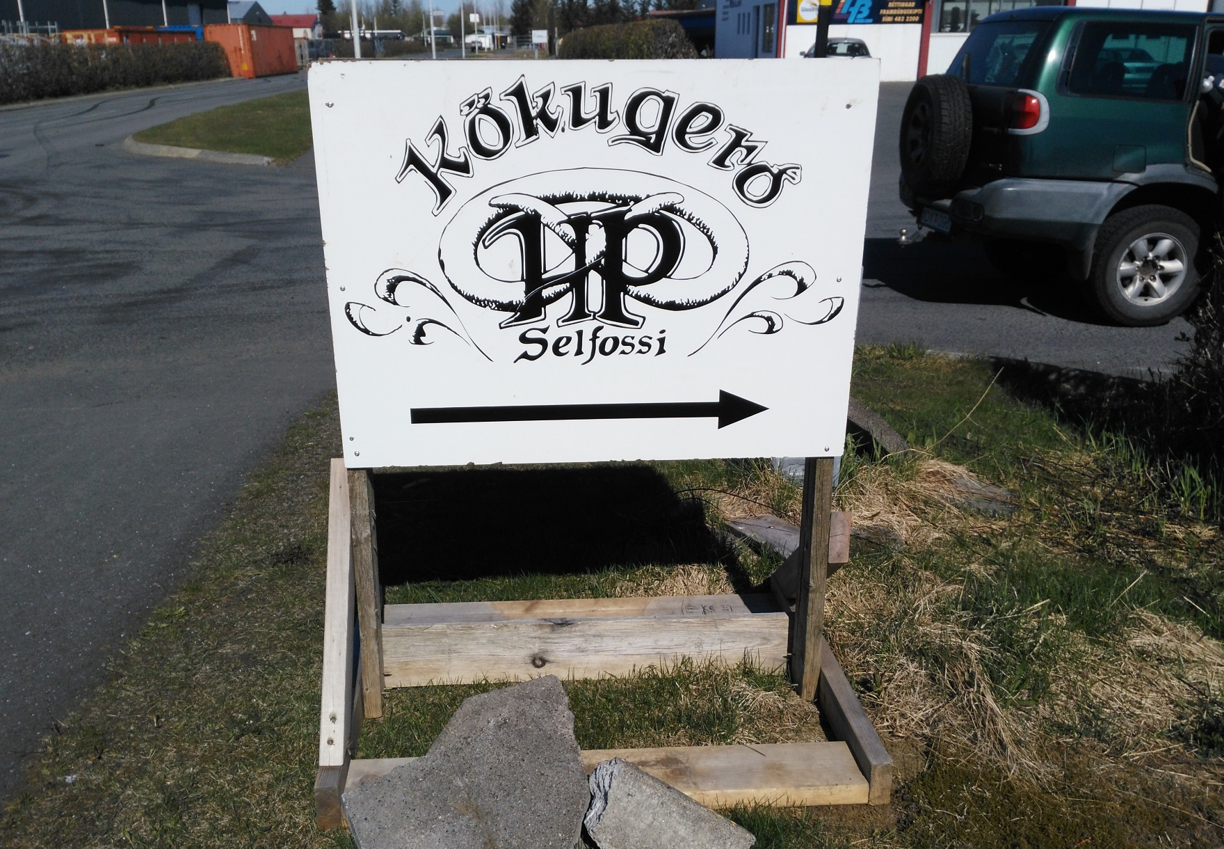 Skilti eftir Ólaf Th Ólafsson